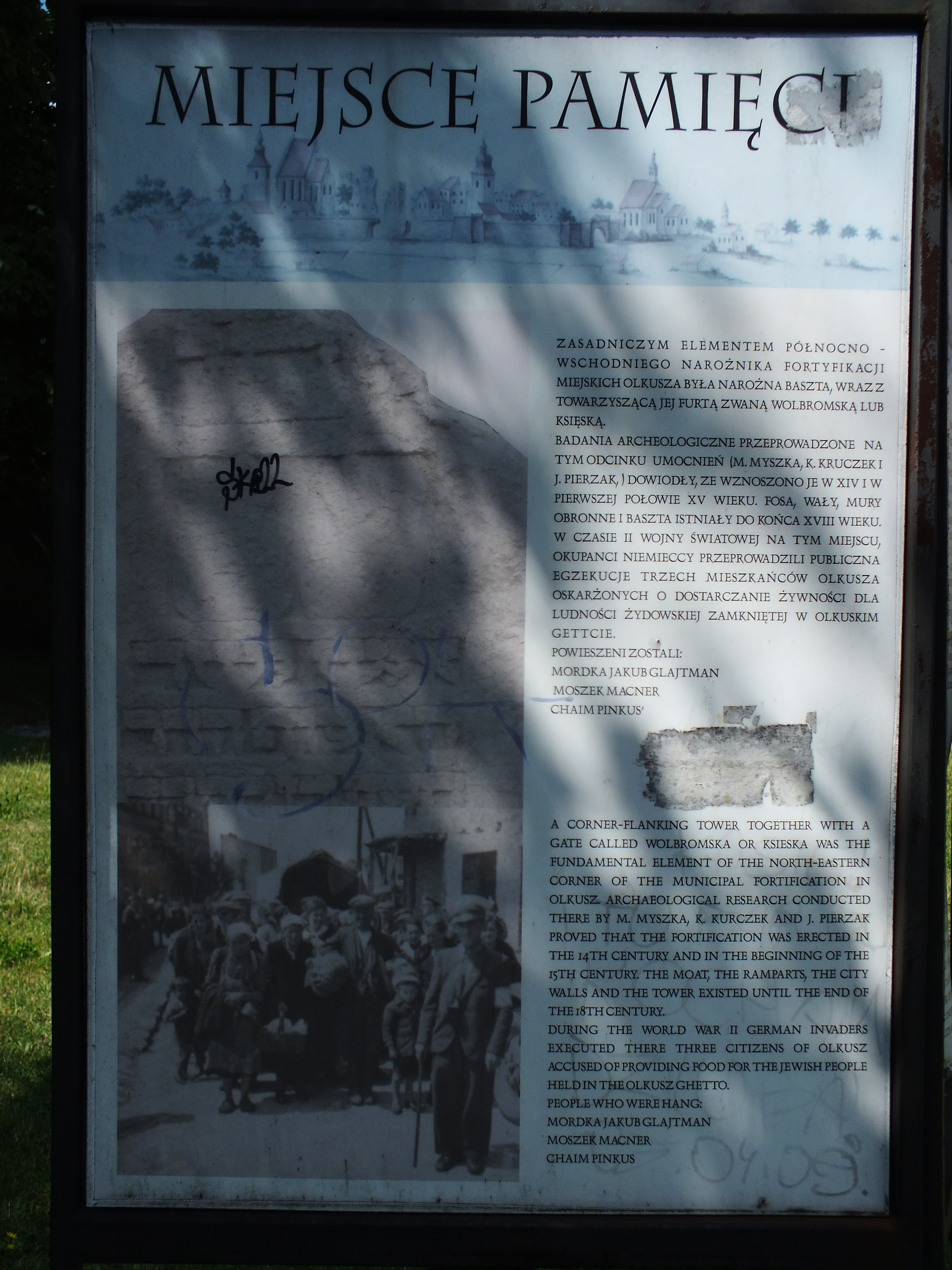 Olkusz ulica Kościuszki miejsca związane z martyrologią narodu żydowskiego